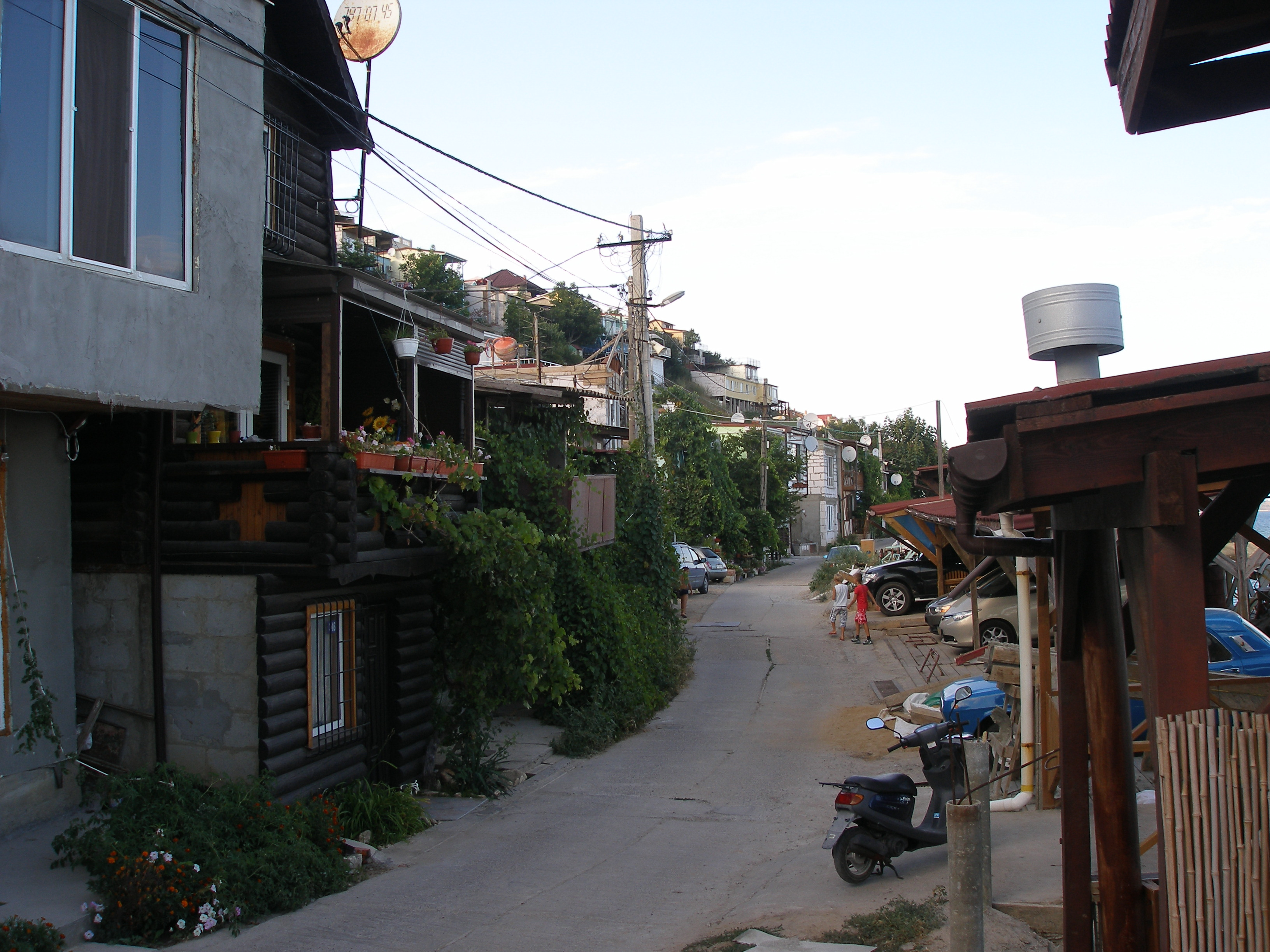 Набережная дачного кооператива